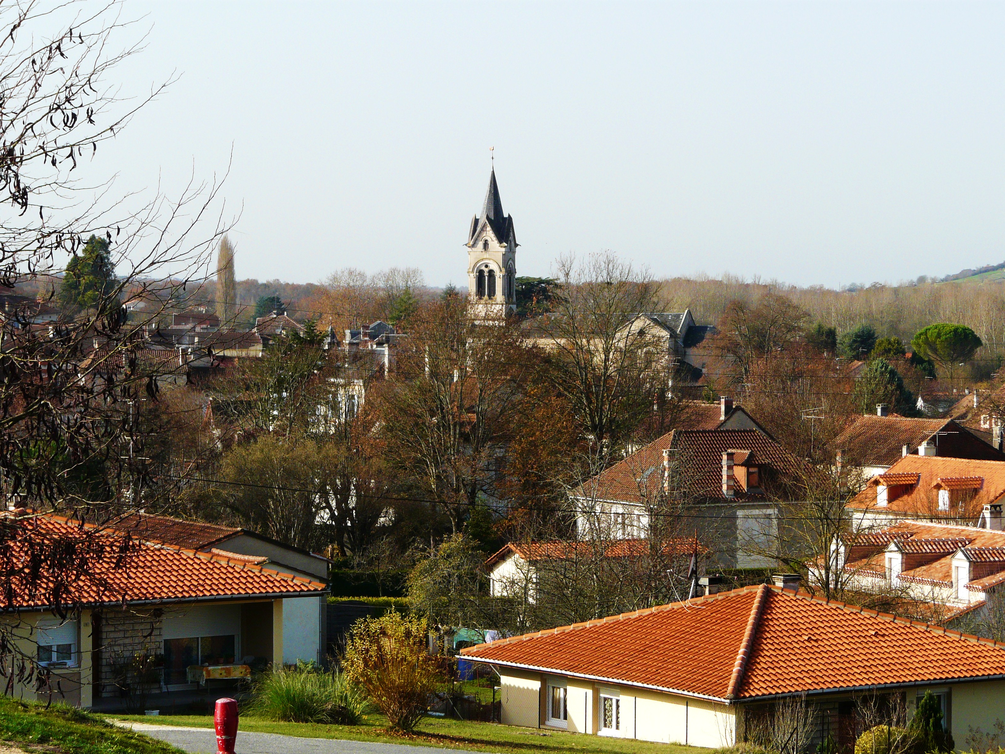 Le bourg de Tocane-Saint-Apre vu depuis l'est, Dordogne, France